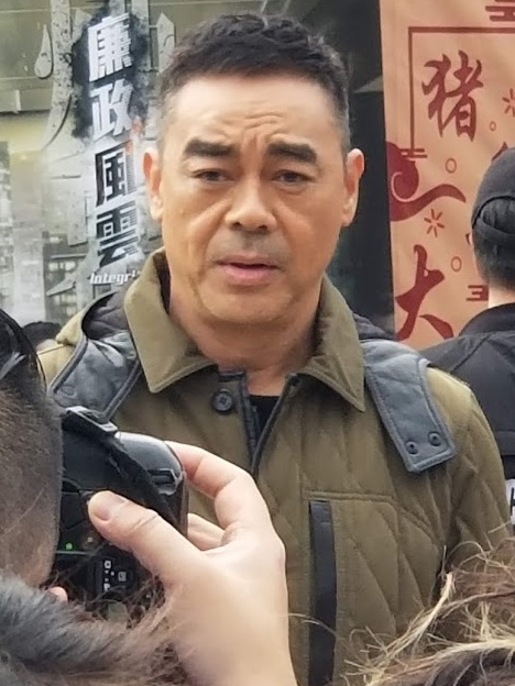 中文（香港）: 劉青雲，2019年1月30日於香港維多利亞公園拍攝。